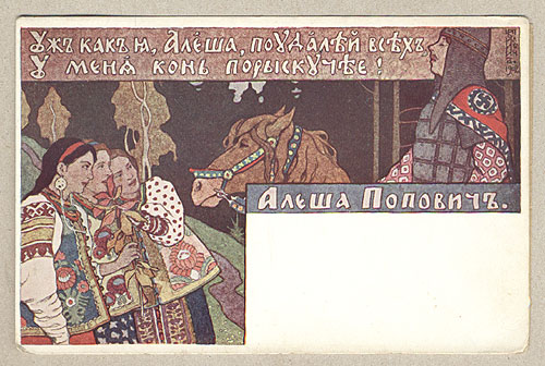 Алёша Попович (открытка по эскизу художника Билибина)